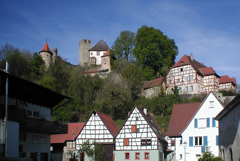 Veste Neidenstein, Rhein-Neckar-Kreis